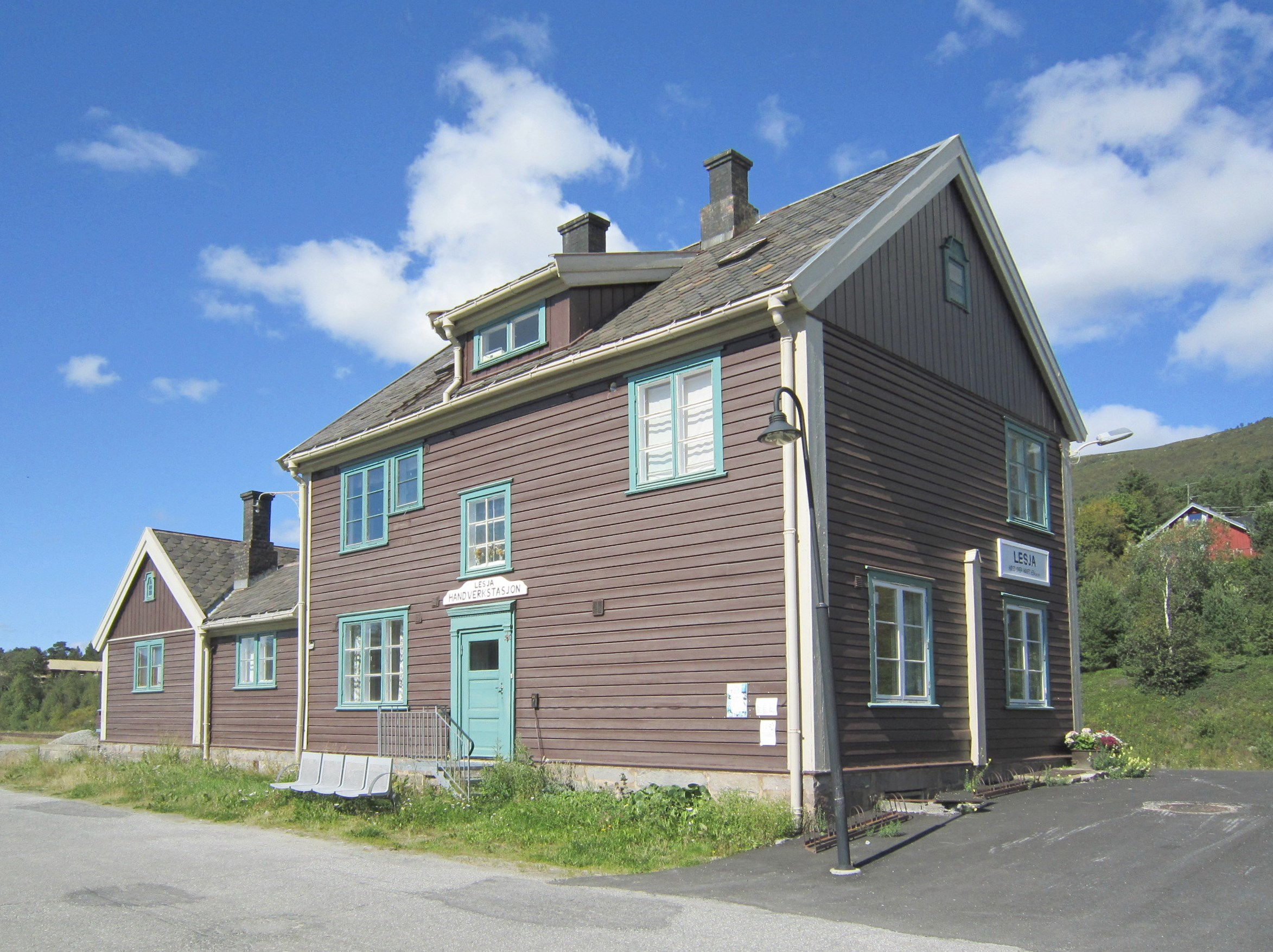 Lesja stasjon på Raumabanen